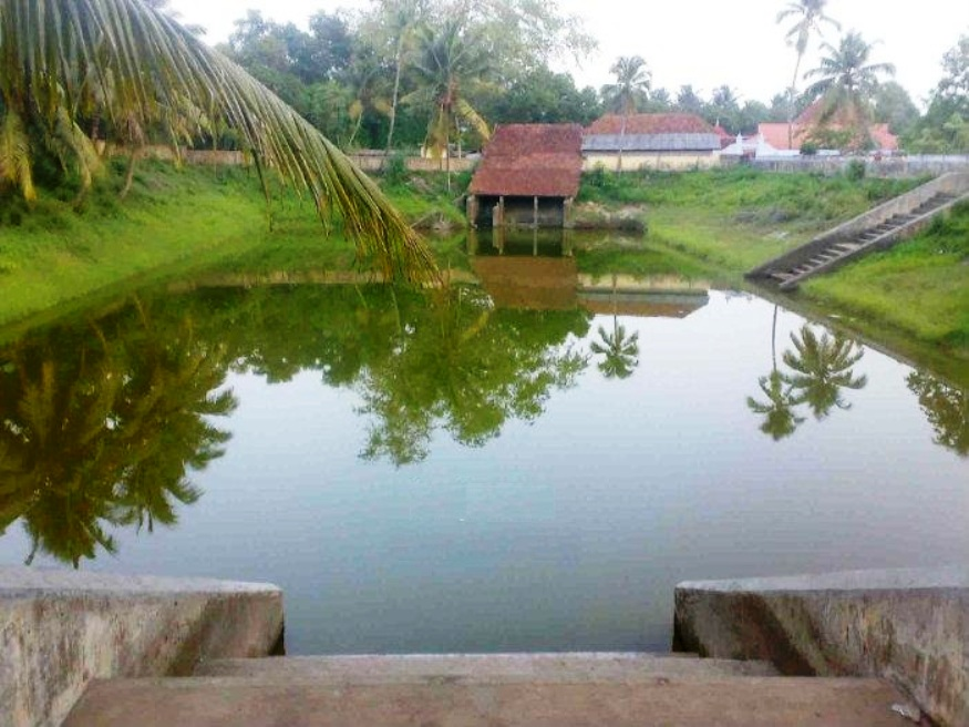 ഉദയമ്പേരൂർ ക്ഷേത്രക്കുളം